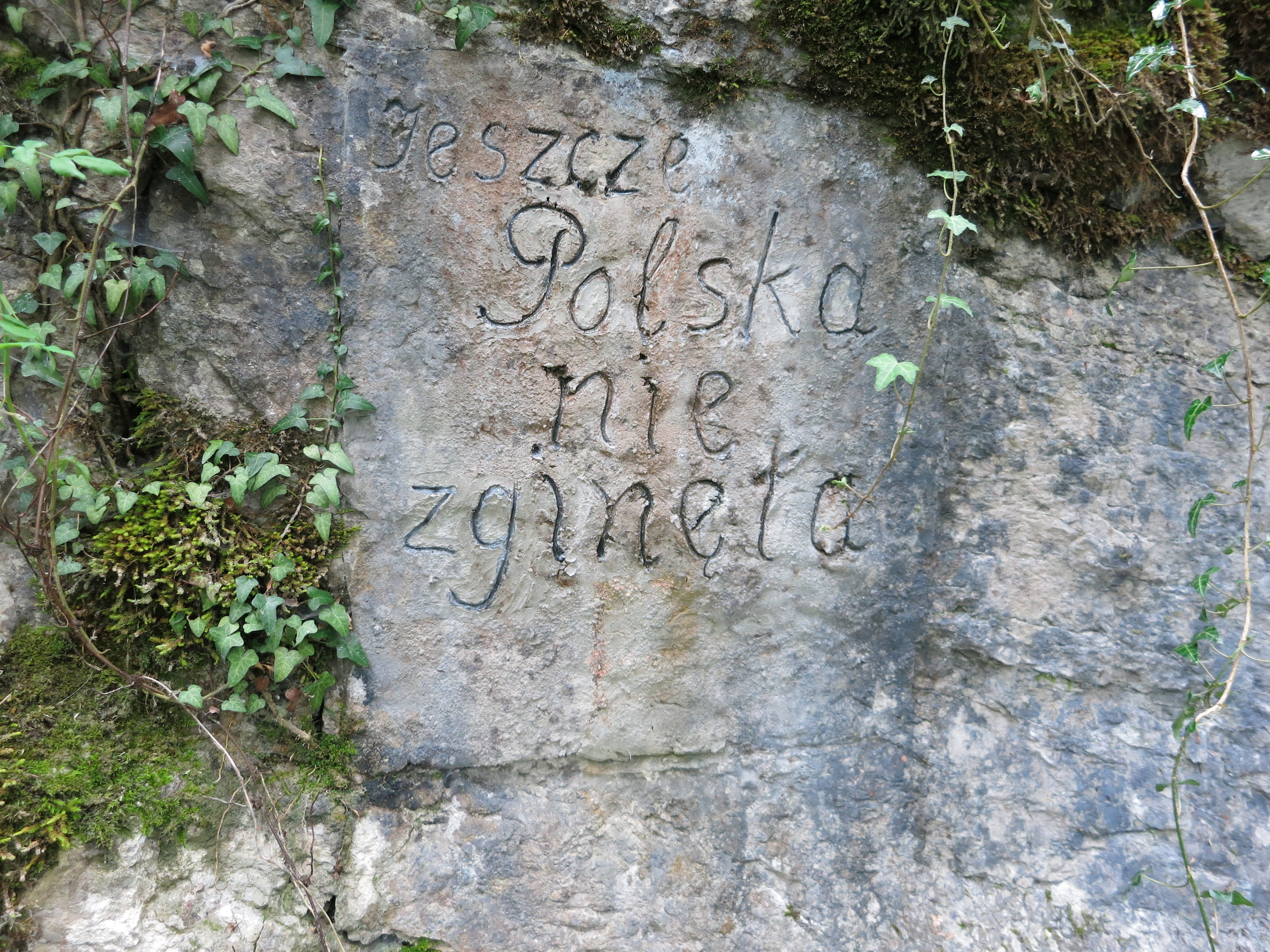 Festung Mueterschwanderberg, Ennetmoos NW, Schweiz: von polnischen Internierten gebaute Strasse zur Festung mit der Inschrift "Noch ist Polen nicht verloren"